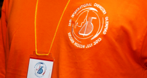 A guide t-shirt during IChO un Moscow